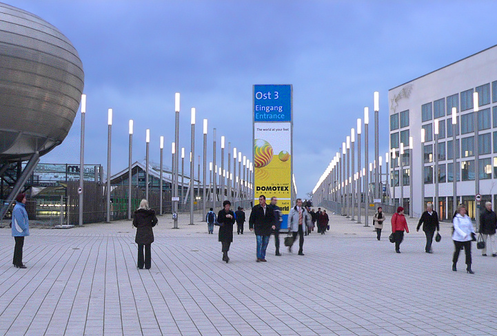 Exponale-Fußgängerbrücke EXPO-Gelände Hannover Foto aufgenommen von Benutzer Benutzer:AxelHH, Januar 2007